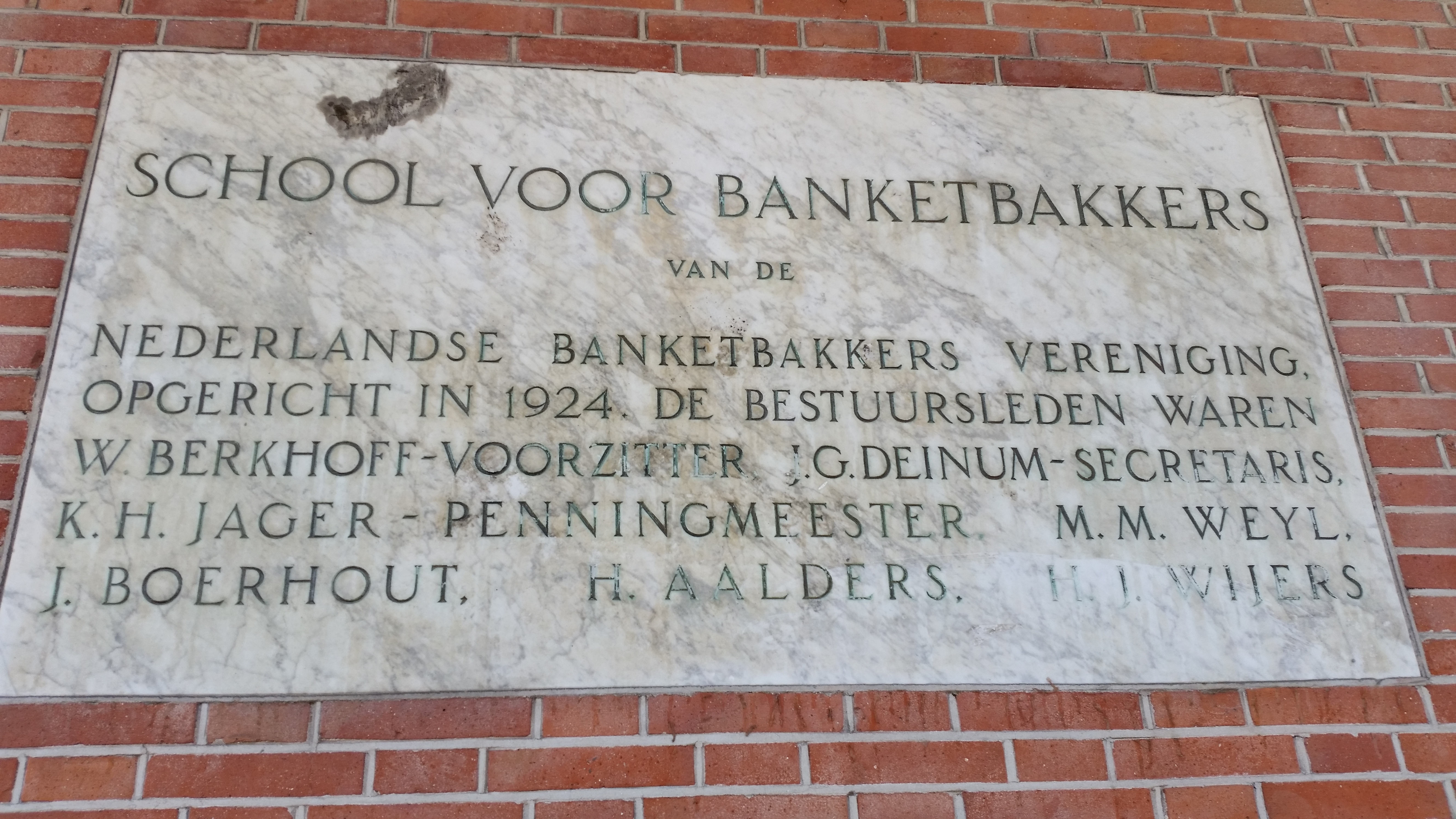 Impressie van Wibautstraat 220-222 te Amsterdam, mei 2020